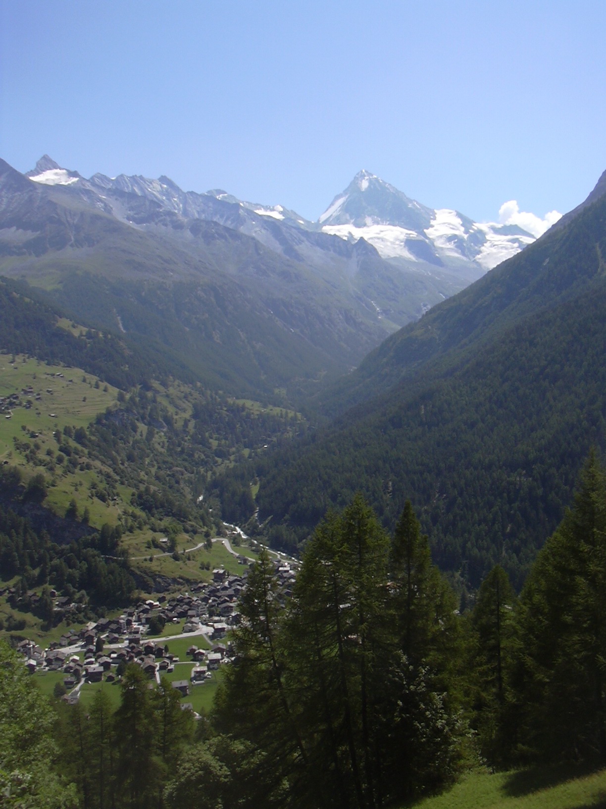 Les Haudères with Dent Blanche, Val d'Hérens, upper Borgne Valley (Switzerland)